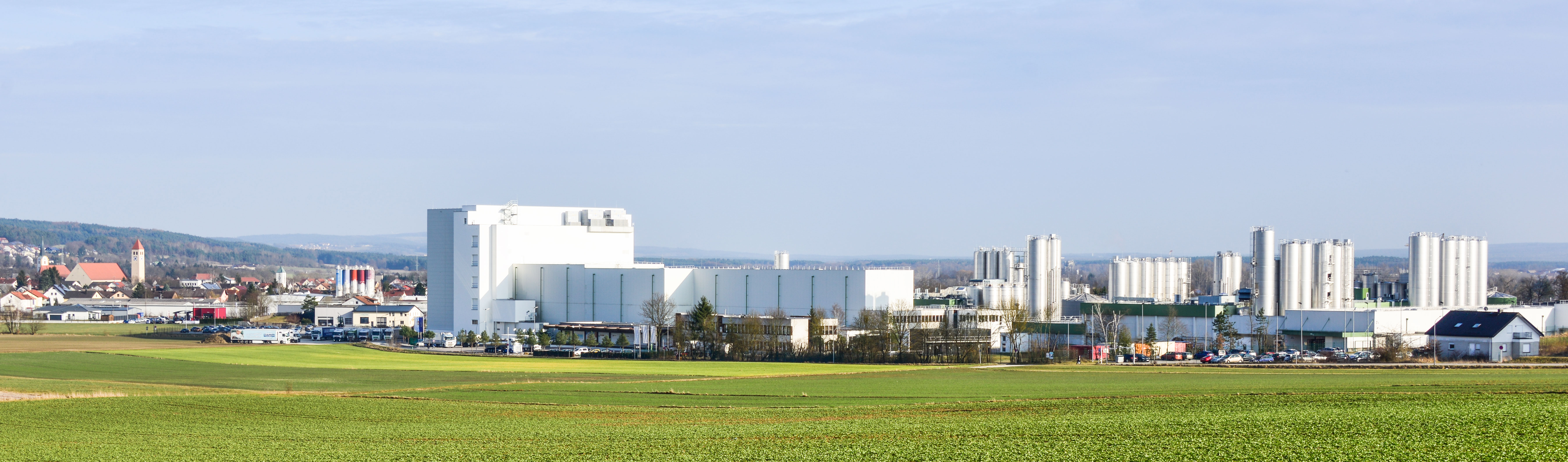 Firmengelände der Privatmolkerei Bechtel mit Blick auf Schwarzenfeld